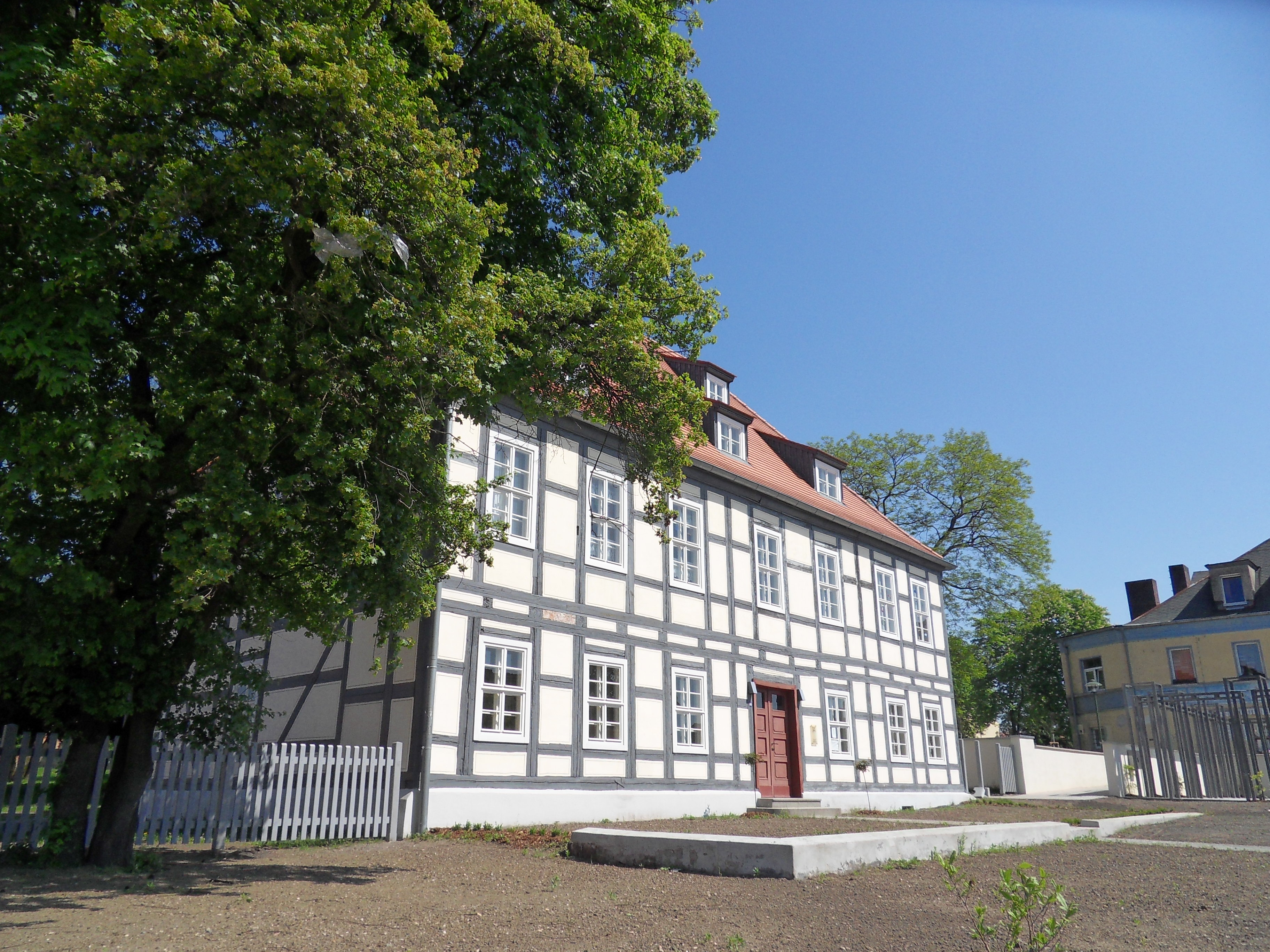 Denkmalgeschütztes Pfarramt in Lauchhammer-Mitte